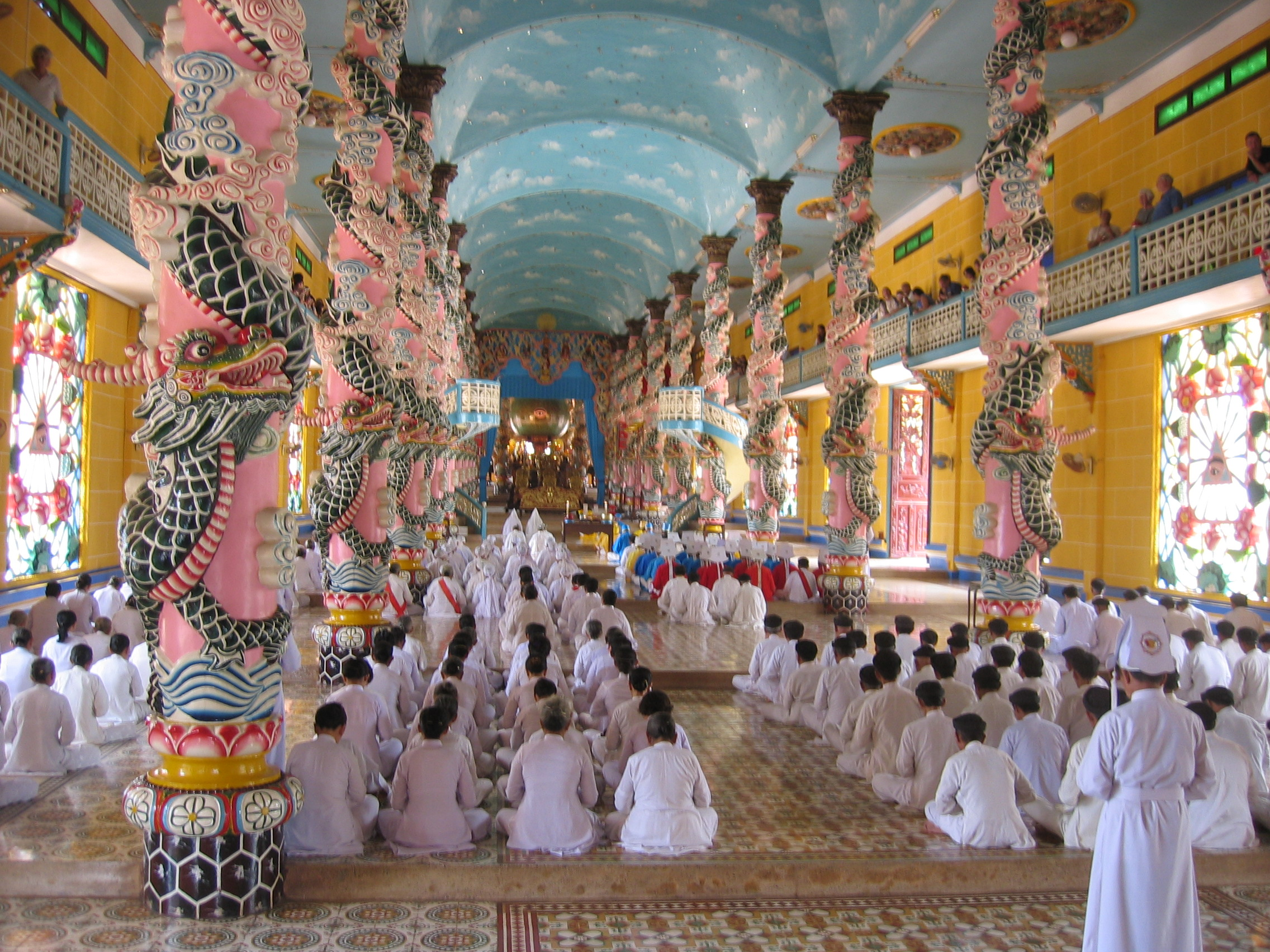 Tempel Cao Dai Innenansicht Tay Ninh Vietnam